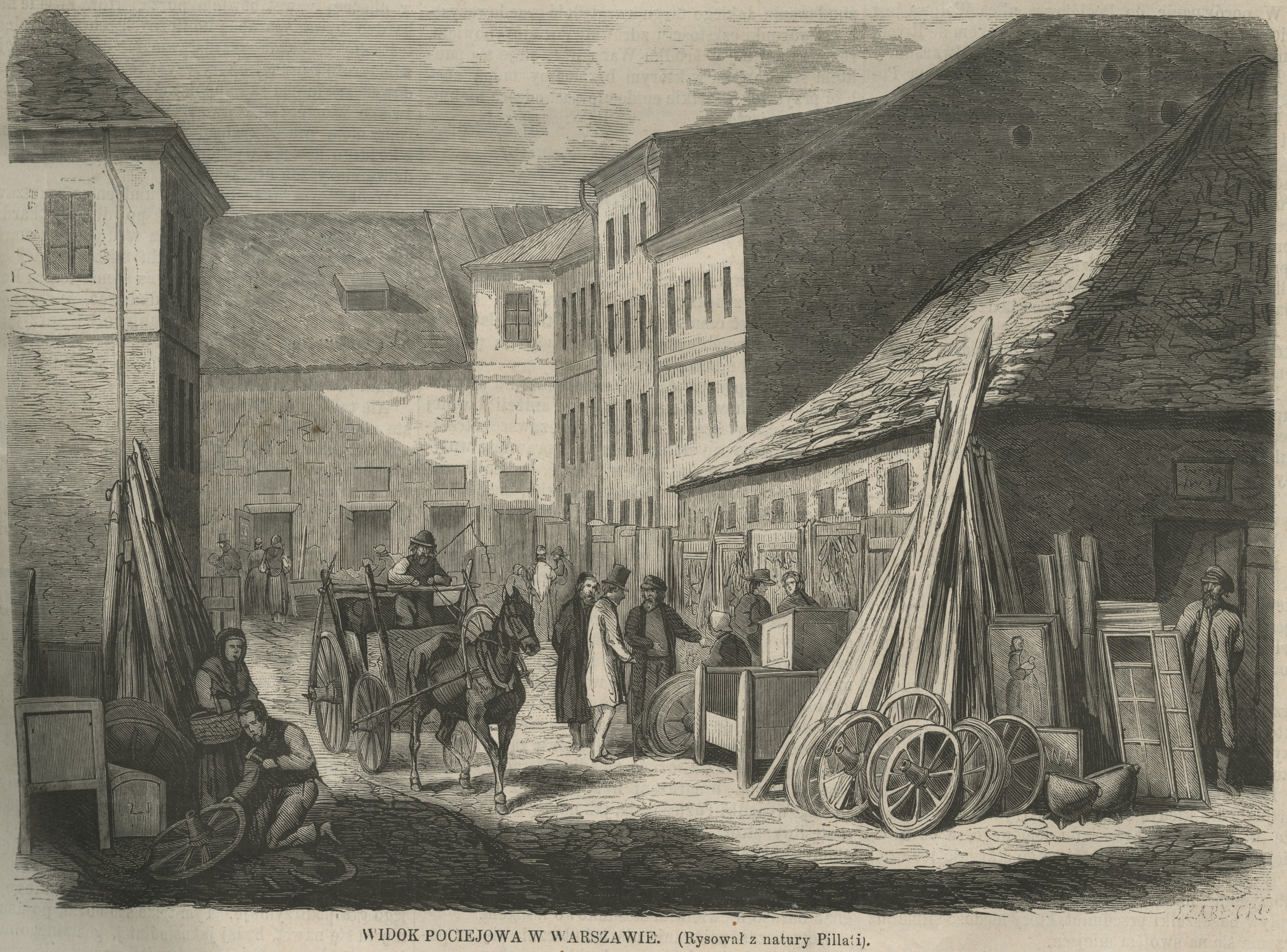 Widok Pociejowa w Warszawie: (Rysował z natury Pillati)